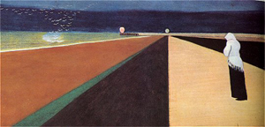 Леон Спиллиарт, "Женщина на дамбе".